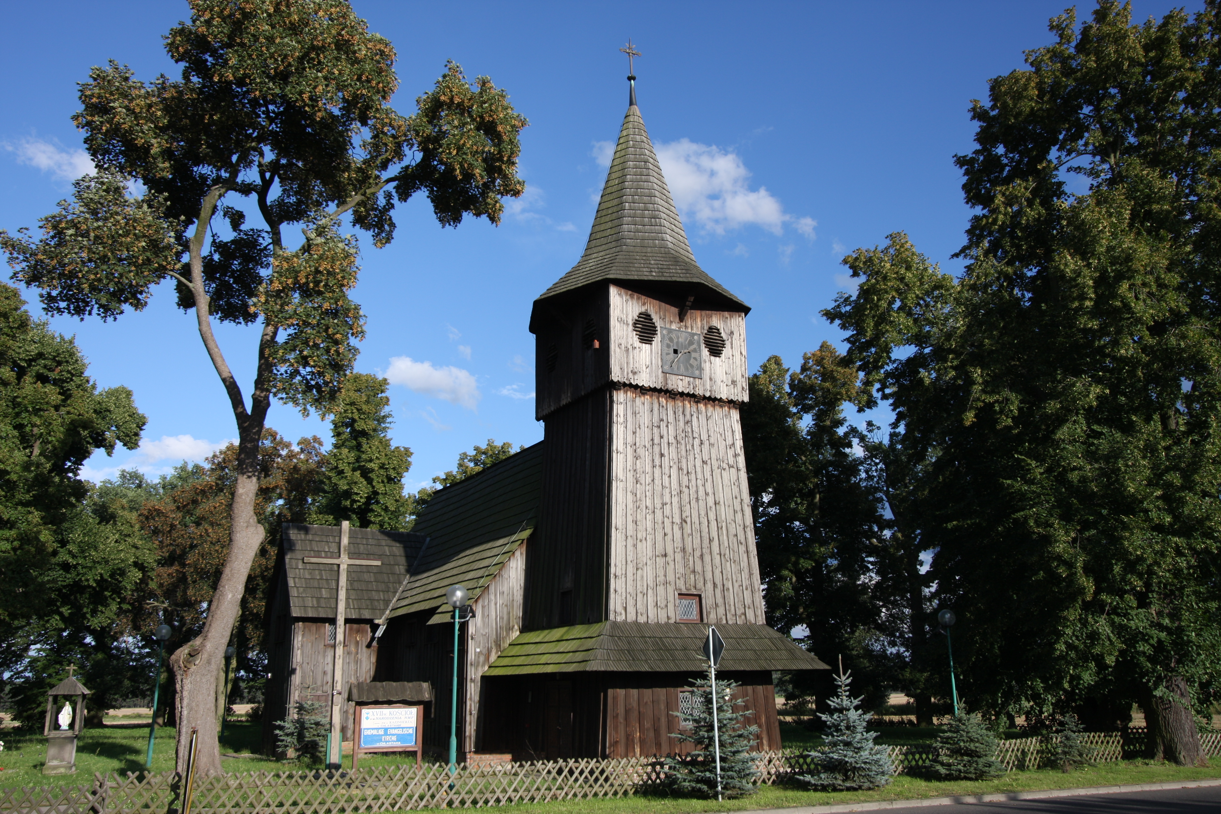 Chlastawa, kościół ewangelicki, ob. rzym.-kat. fil. p.w. Narodzenia NMP, drewn., 1637, 1692, kon. XIX